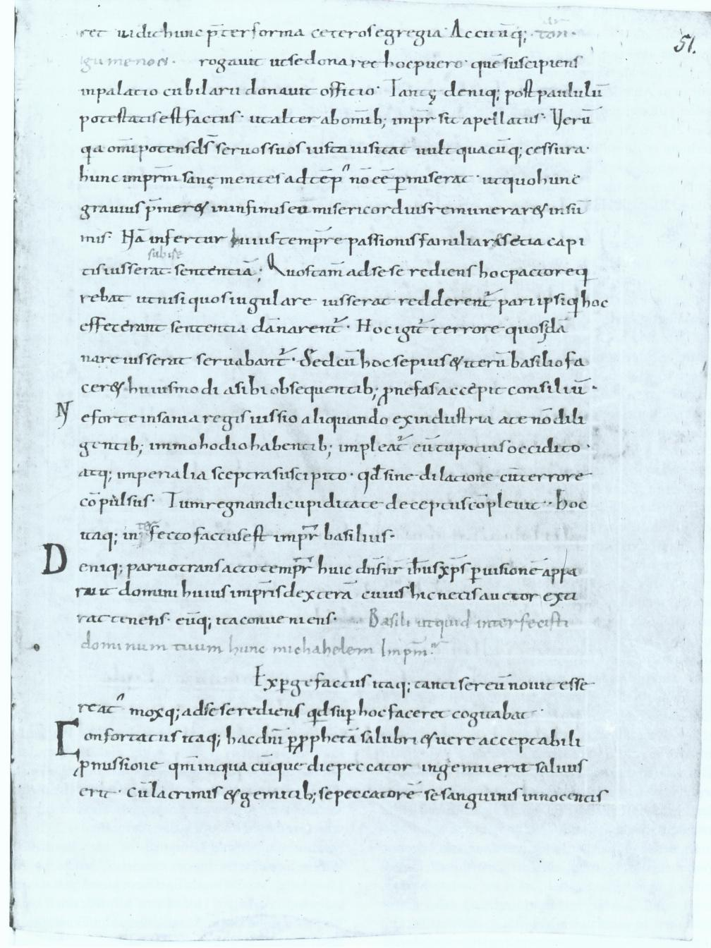 Liudprand von Cremona, Antapodosis (Ausschnitt aus III, c. 32-34) Oberitalien, zweite Hälfte 10. Jahrhundert. München, Bayerische Staatsbibliothek, Clm 6388, fol. 51r